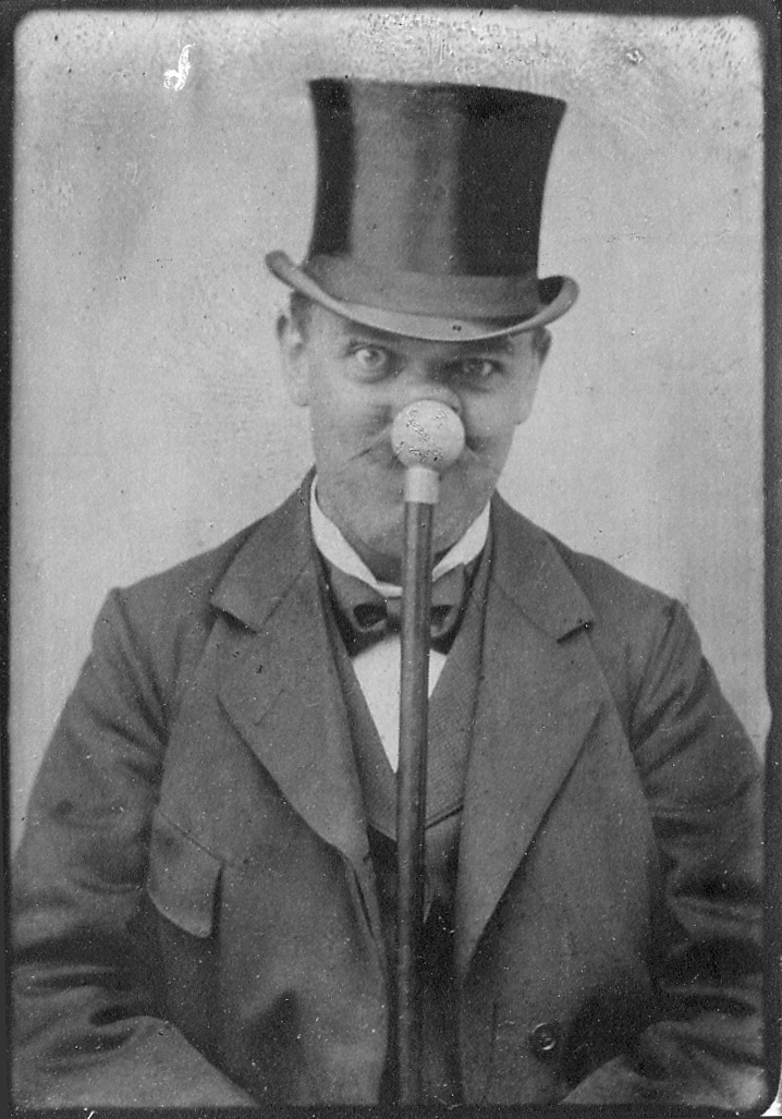 Redaktören och humoristen Waldemar Bülow (1864-1934) på ett skämtfoto från tidigt 1900-tal